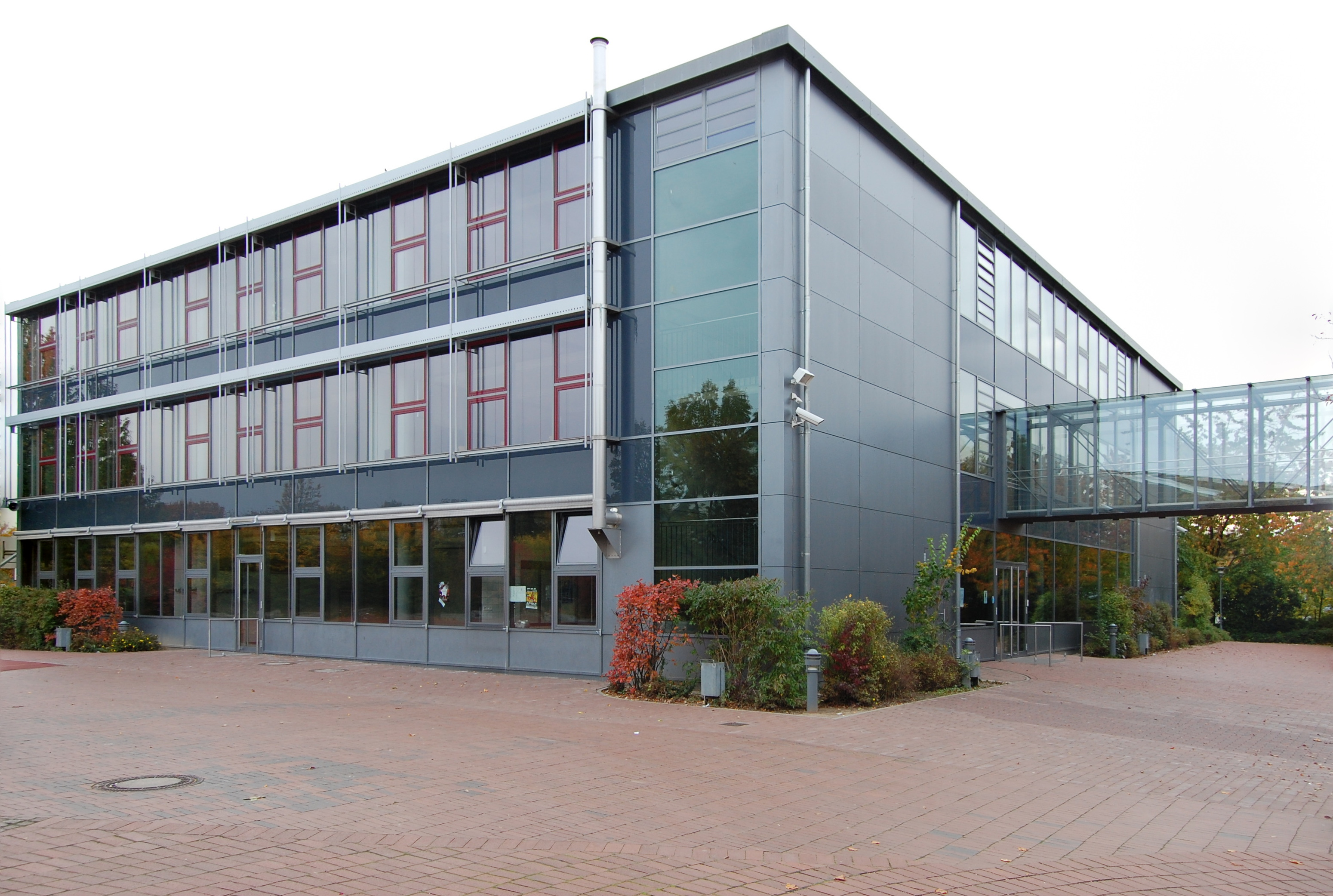 Gebäude für die Klassen 5 und 6 des Gymnasiums Nieder-Olm bei Mainz